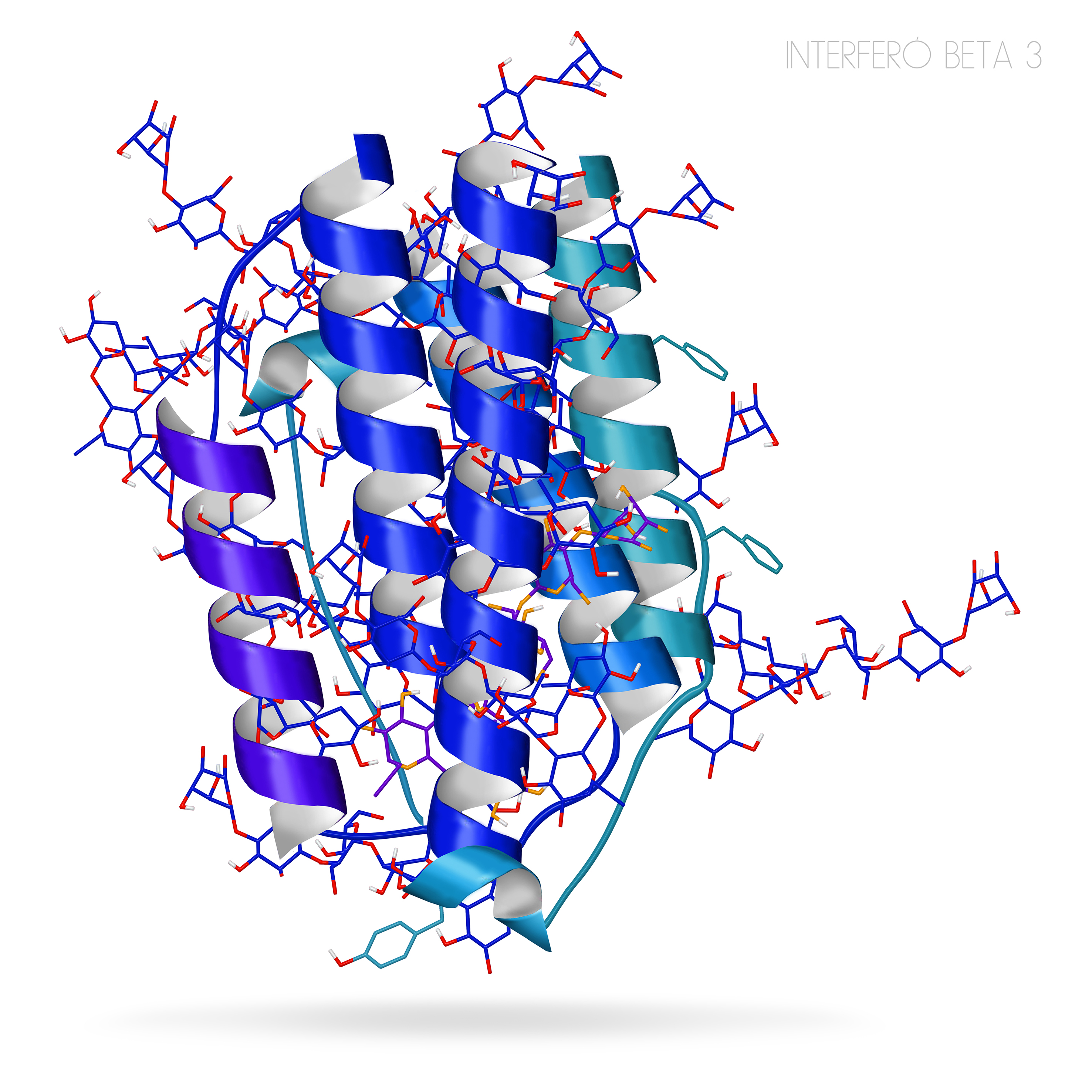 Estructura tridimensional de l´interferó beta-3.